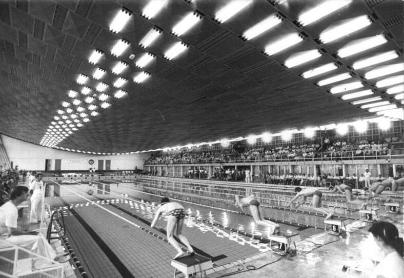 Leipzig, Deutsche Hochschule für Körperkultur, Schwimmhalle ADN-ZB Kluge 23.9.1985 Leipzig: DHfK-Schwimmhalle. Blick in die Schwimmhalle der Deutschen Hochschule für Körperkultur Leipzig während der DDR-Meisterschaften im Sportschwimmen im Juni 1985. Das 50-m-Becken wird für die Ausbildung der in- und ausländischen Studenten und auch für das Training des SC DMfK genutzt.